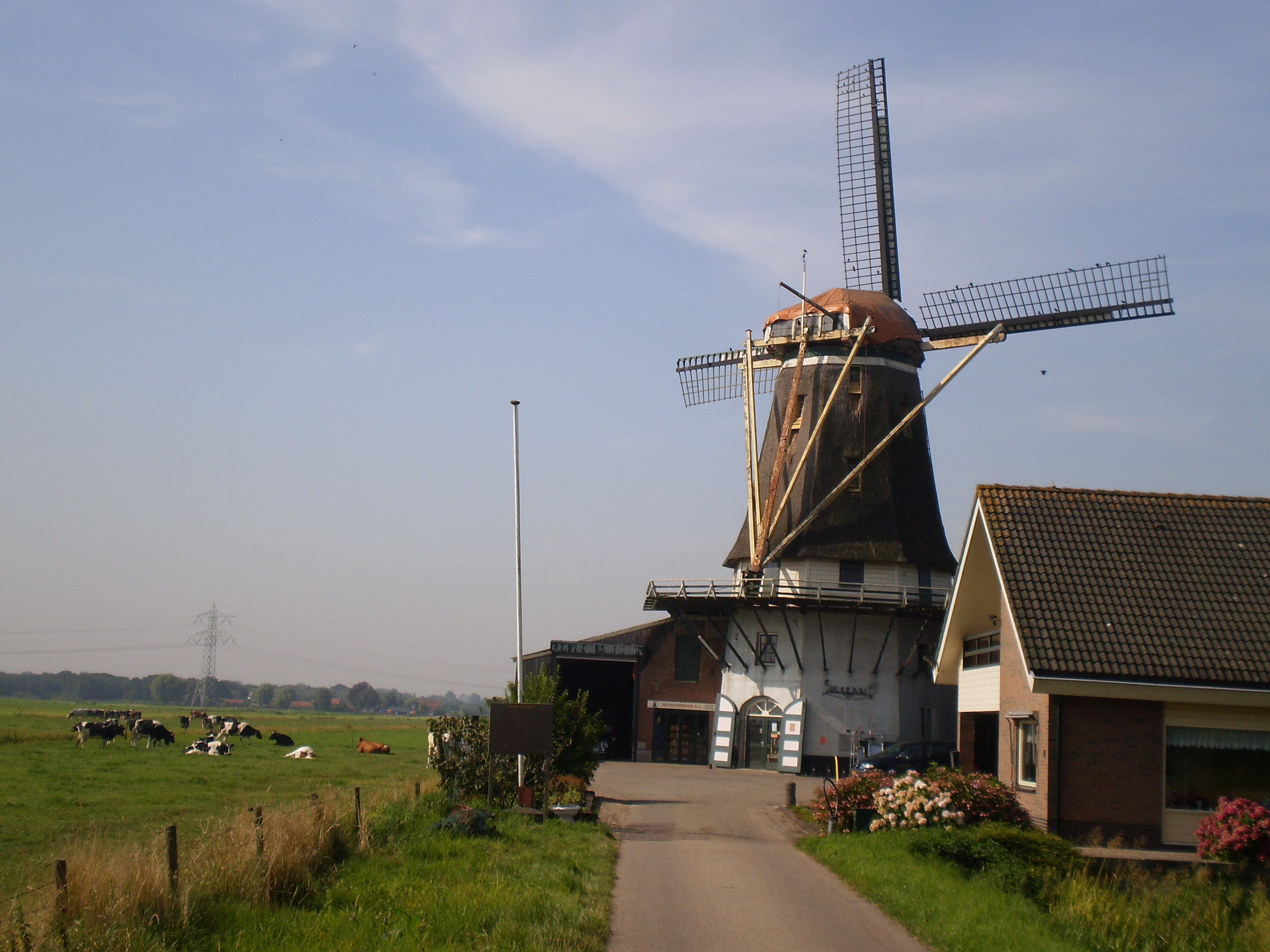 Westbroek mûne De Kraai